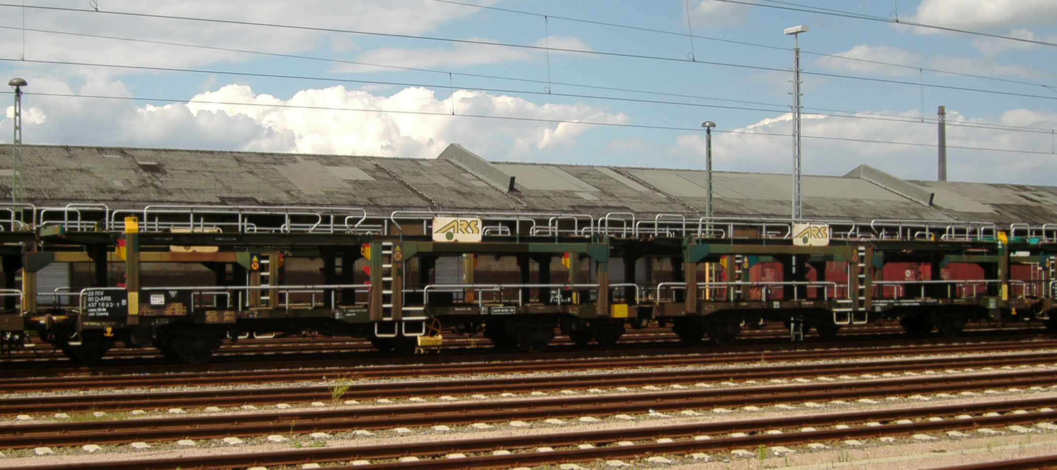 Doppelstock-Flachwagen für Kfz-Beförderung der ARS Altmann AG, aufgenommen im Bahnhof Glauchau